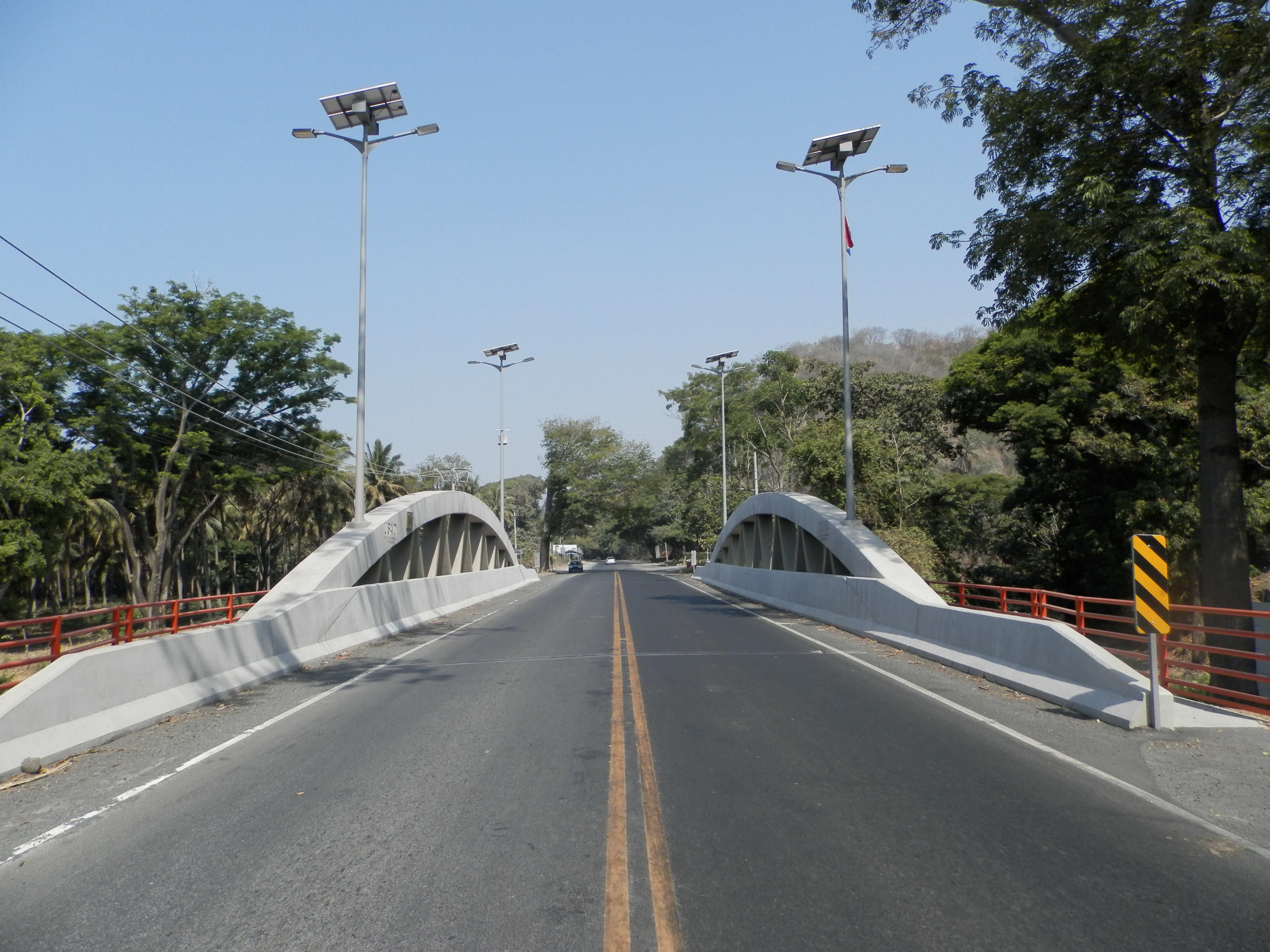 Puente rió San Antonio El Salvador